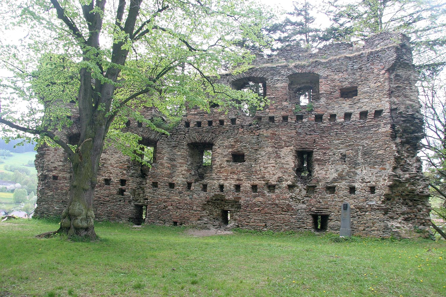 Dalečín - zřícenina hradu Dalečín, okres Žďár nad Sázavou